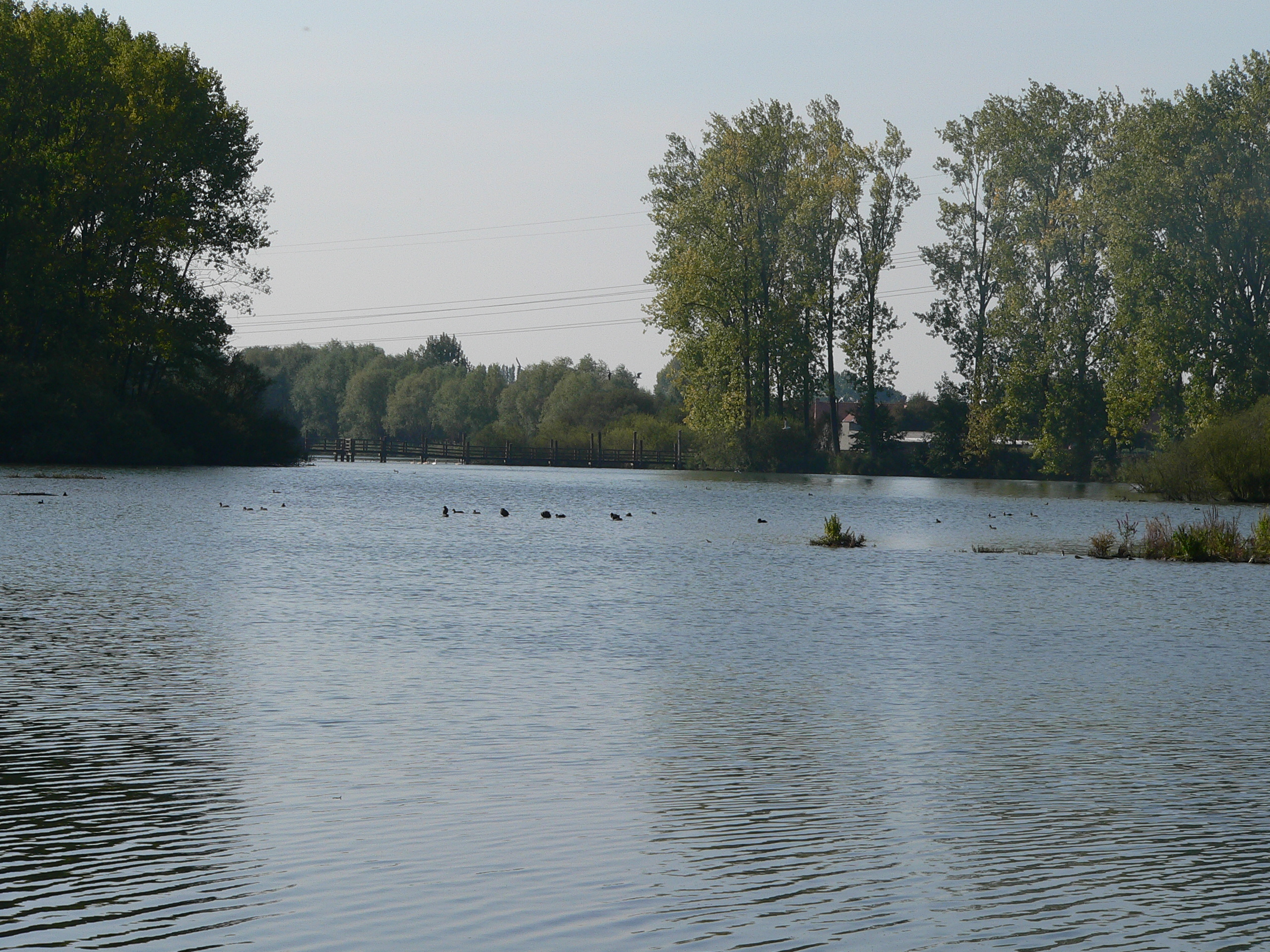 Fretin - Le marais du Warlet